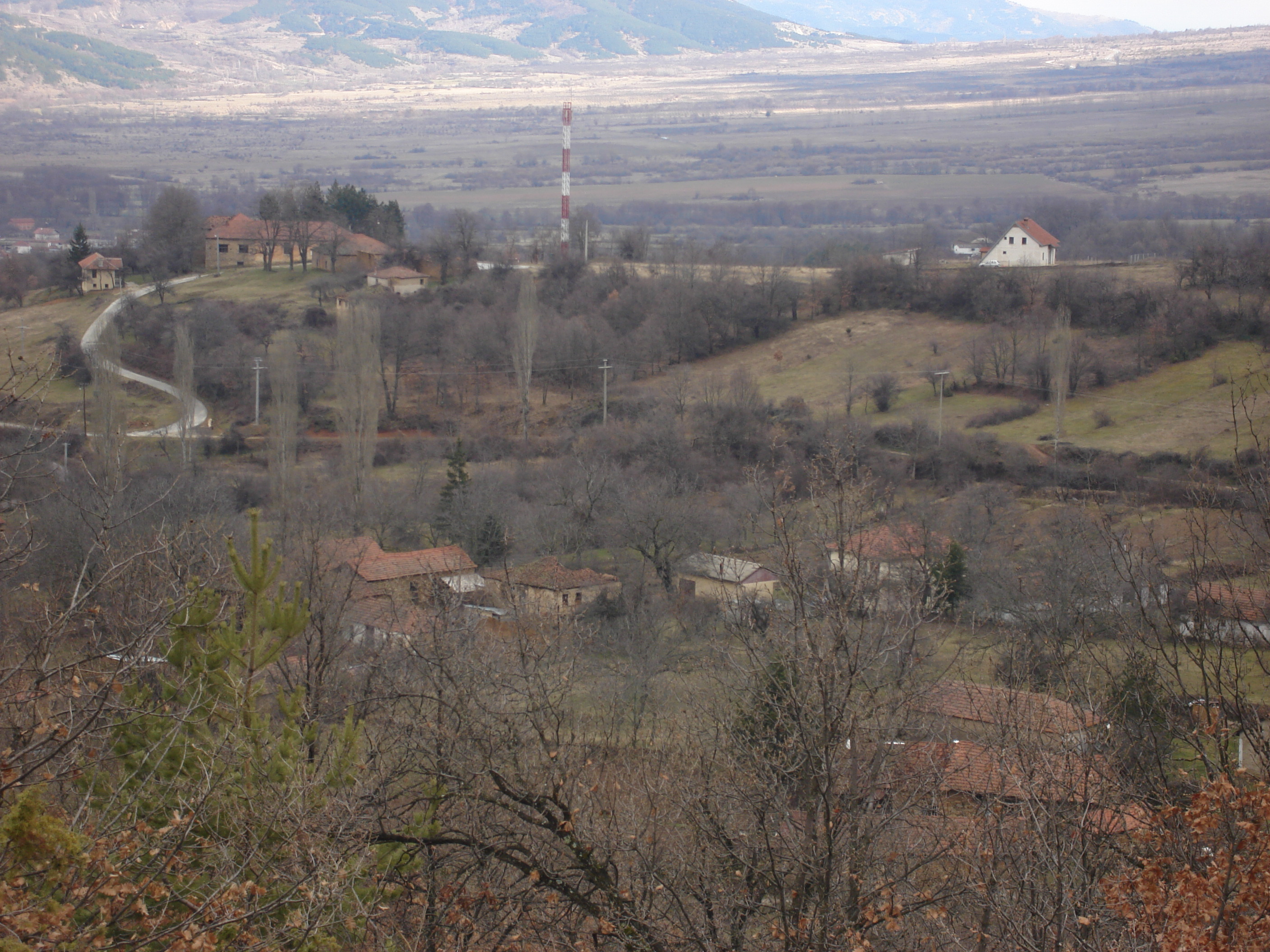 село Ѓавато - Училиште